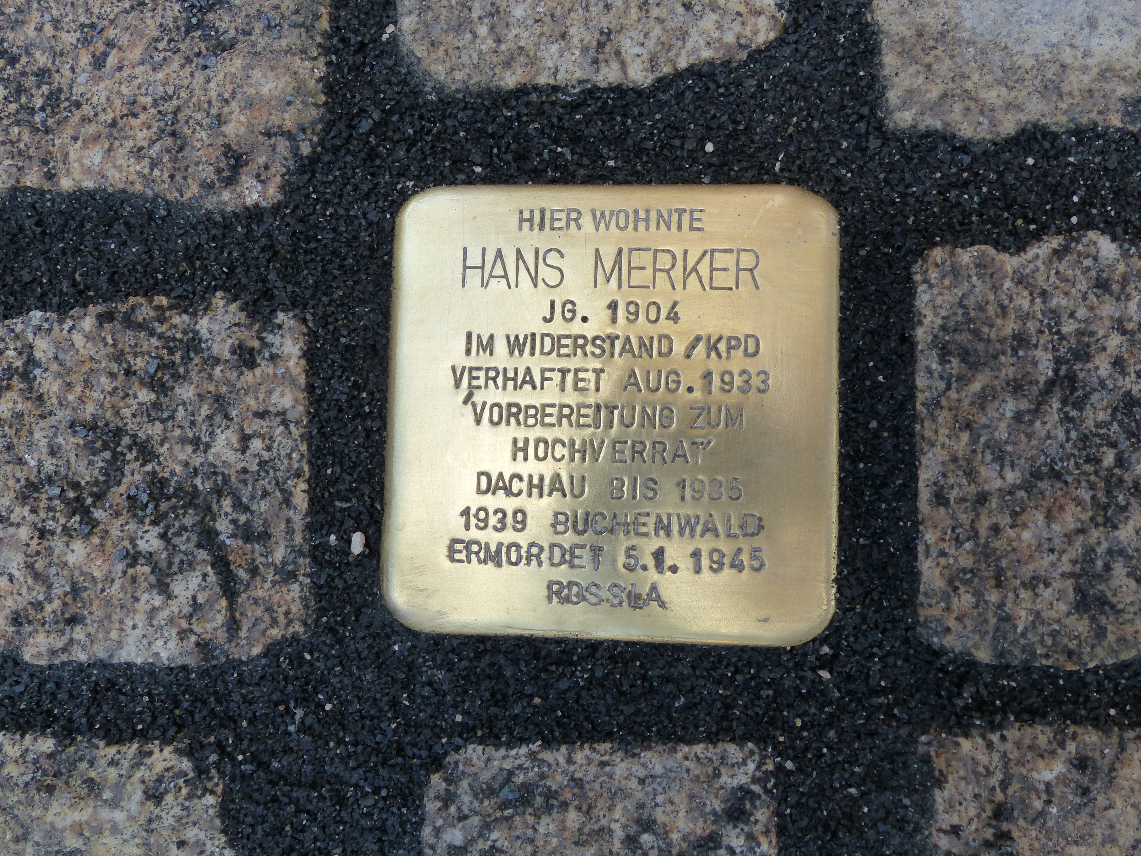 Verlegung des Stolpersteins für Hans Merker